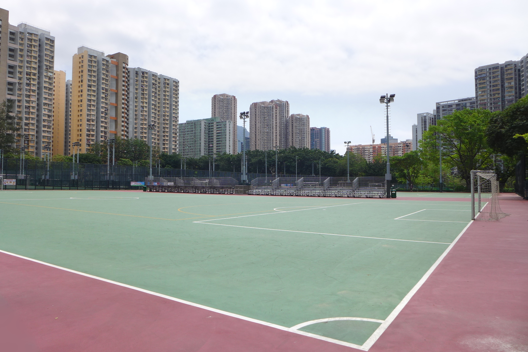 Morse Park No.3 Football Field 1 view